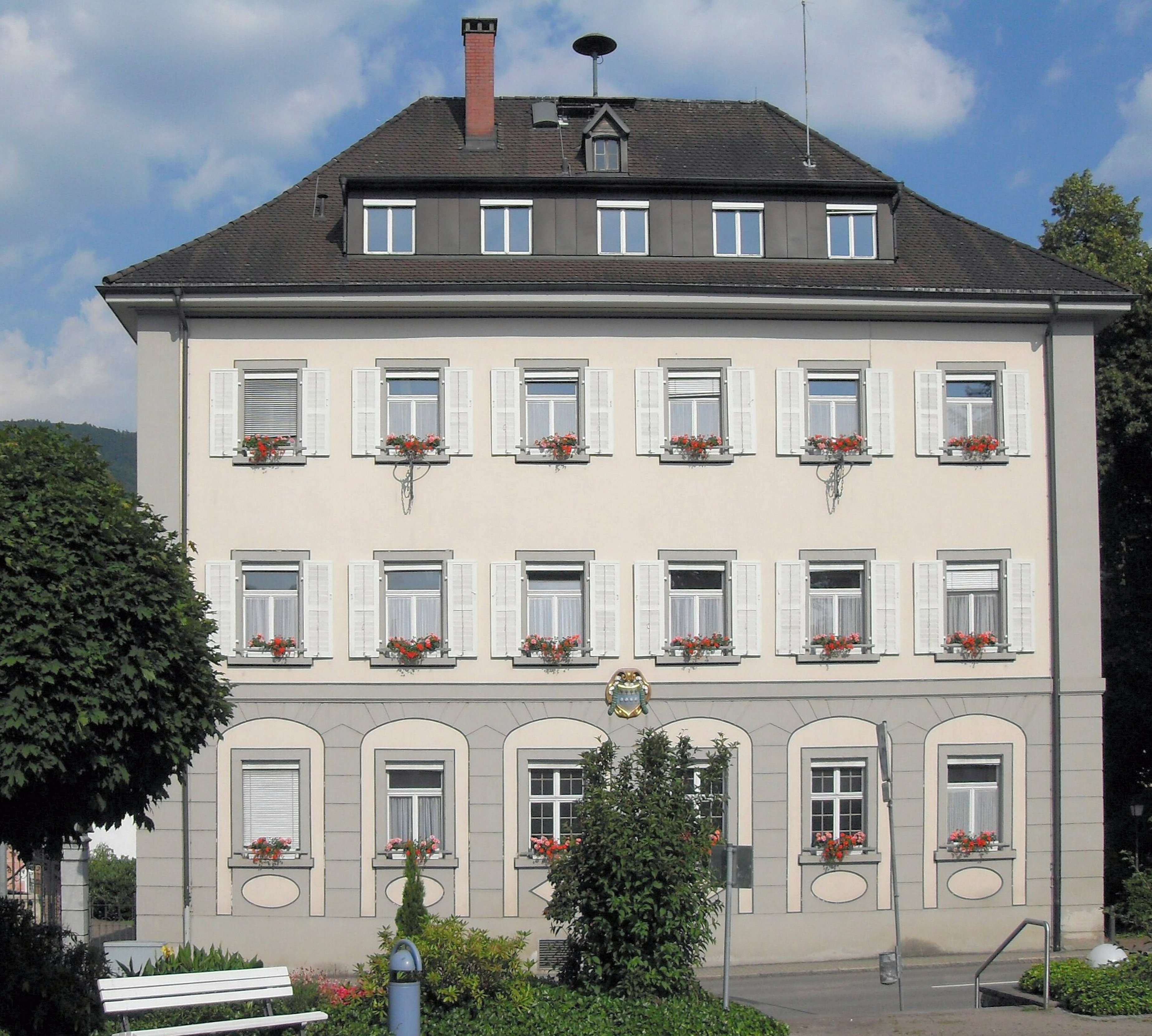 Rathaus in Wehr im Neuen Schloss